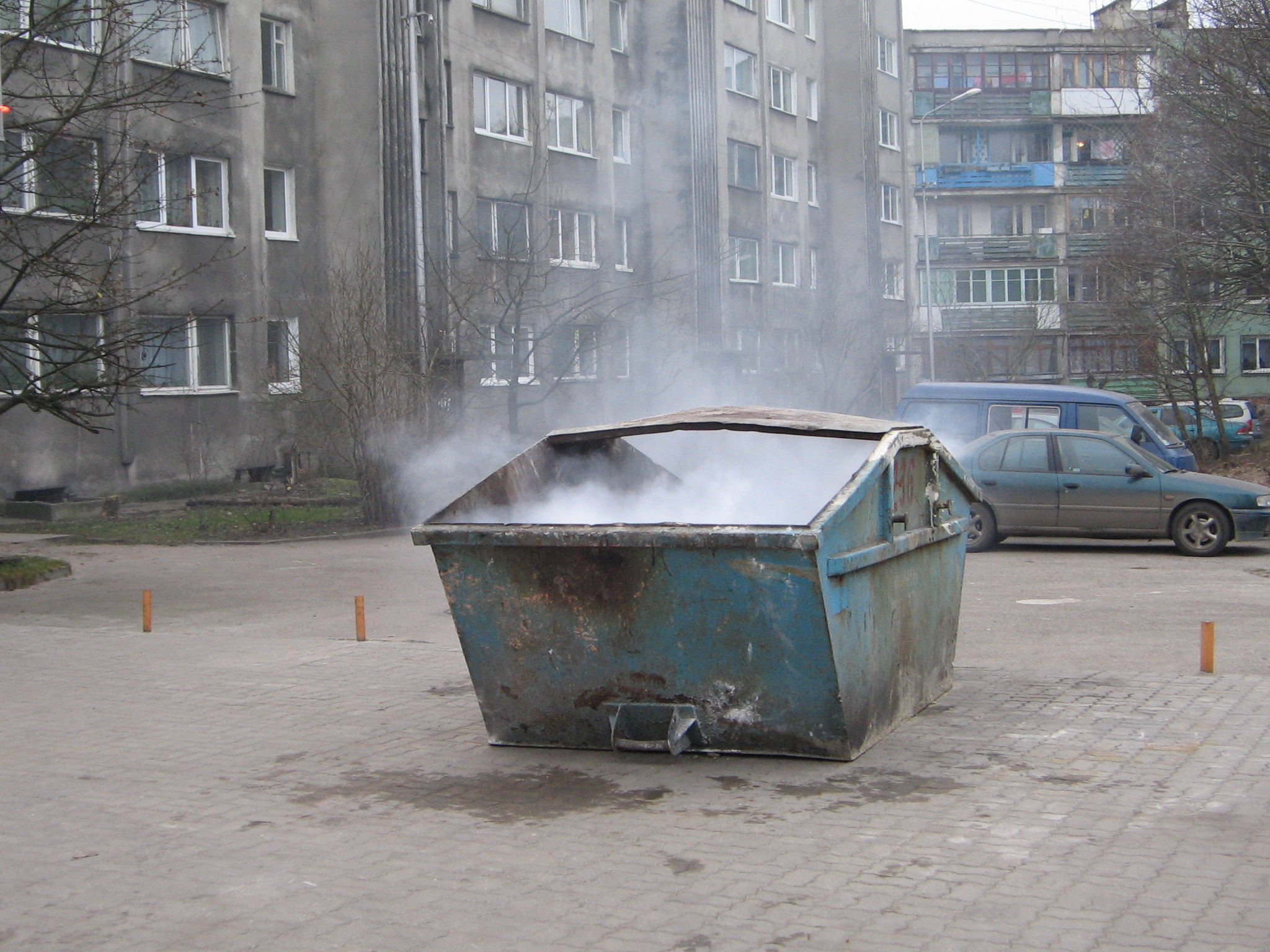 Дымящийся мусорный бак в городе Калининград, Россия, 26 декабря 2007.